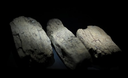 Von dem Eichenholz der Totenhütte gab es noch die Bohlen. Das Fälldatum der Bäume konnte nicht genau bestimmt werden, denn die äußeren Jahresringe, die der Baum zuletzt gebildet hatte, wurden bei der Bearbeitung abgetrennt. Aus diesem Grund wurde die Eiche wohl nach 1942 v. Chr. gefällt. Und wann die Totenhütte errichtet wurde, gleich nach dem Fällen oder viele Jahre später, ist mit der Dendrochronologie nicht zu bestimmen.